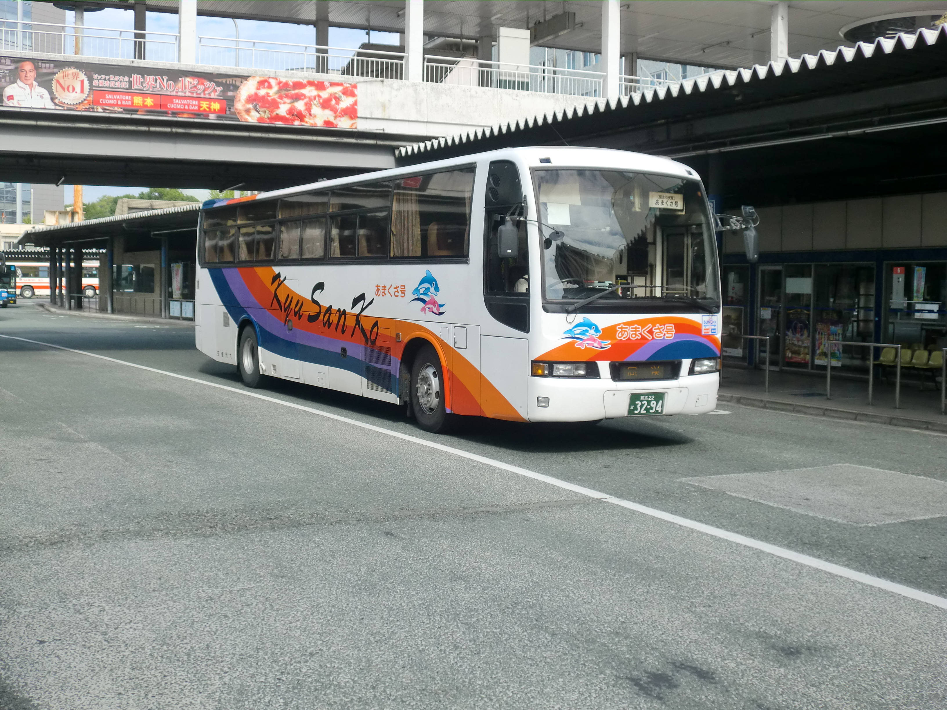 九州産交バスあまくさ号